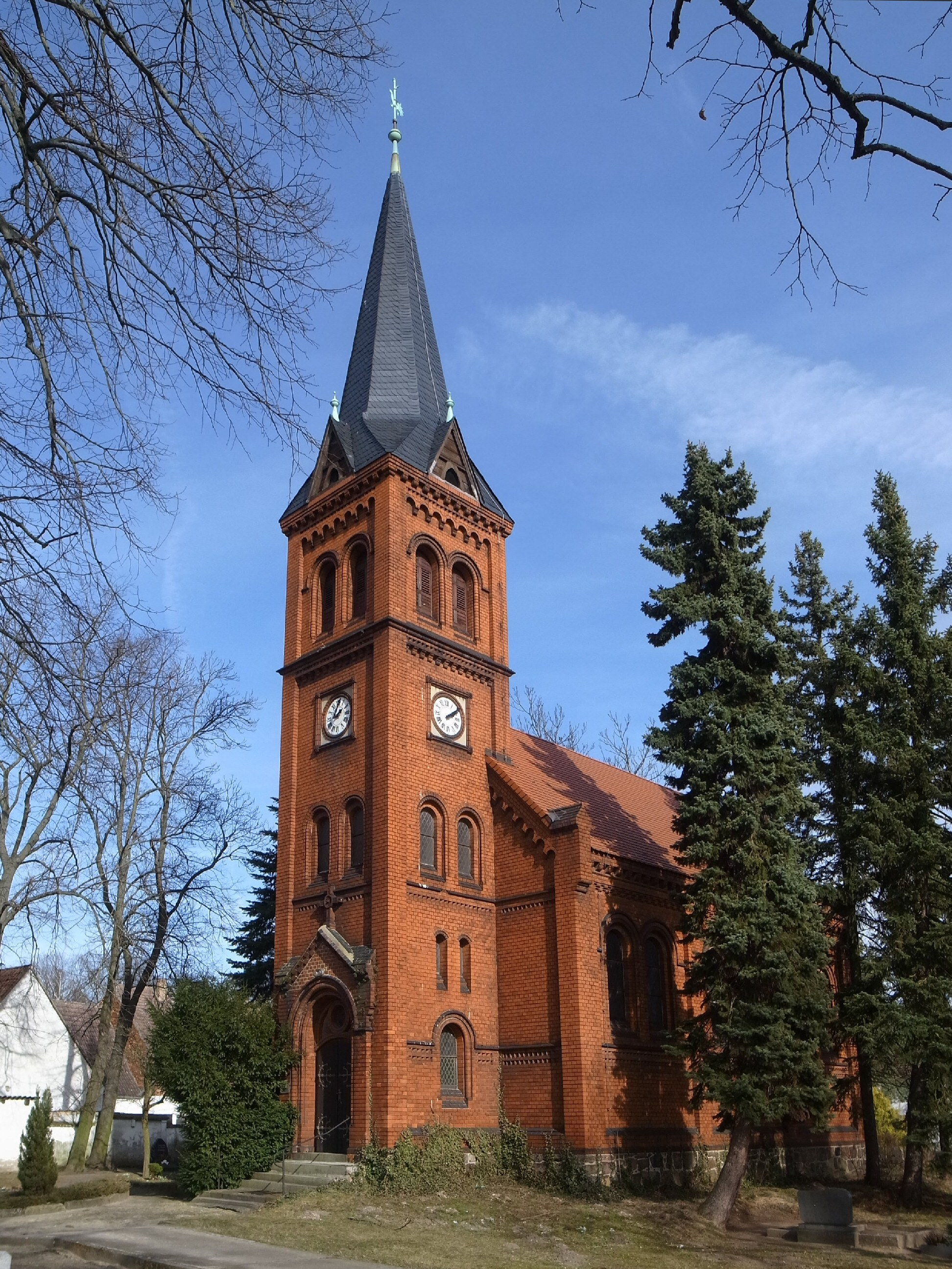 Evangelische Kirche zu Jütrichau